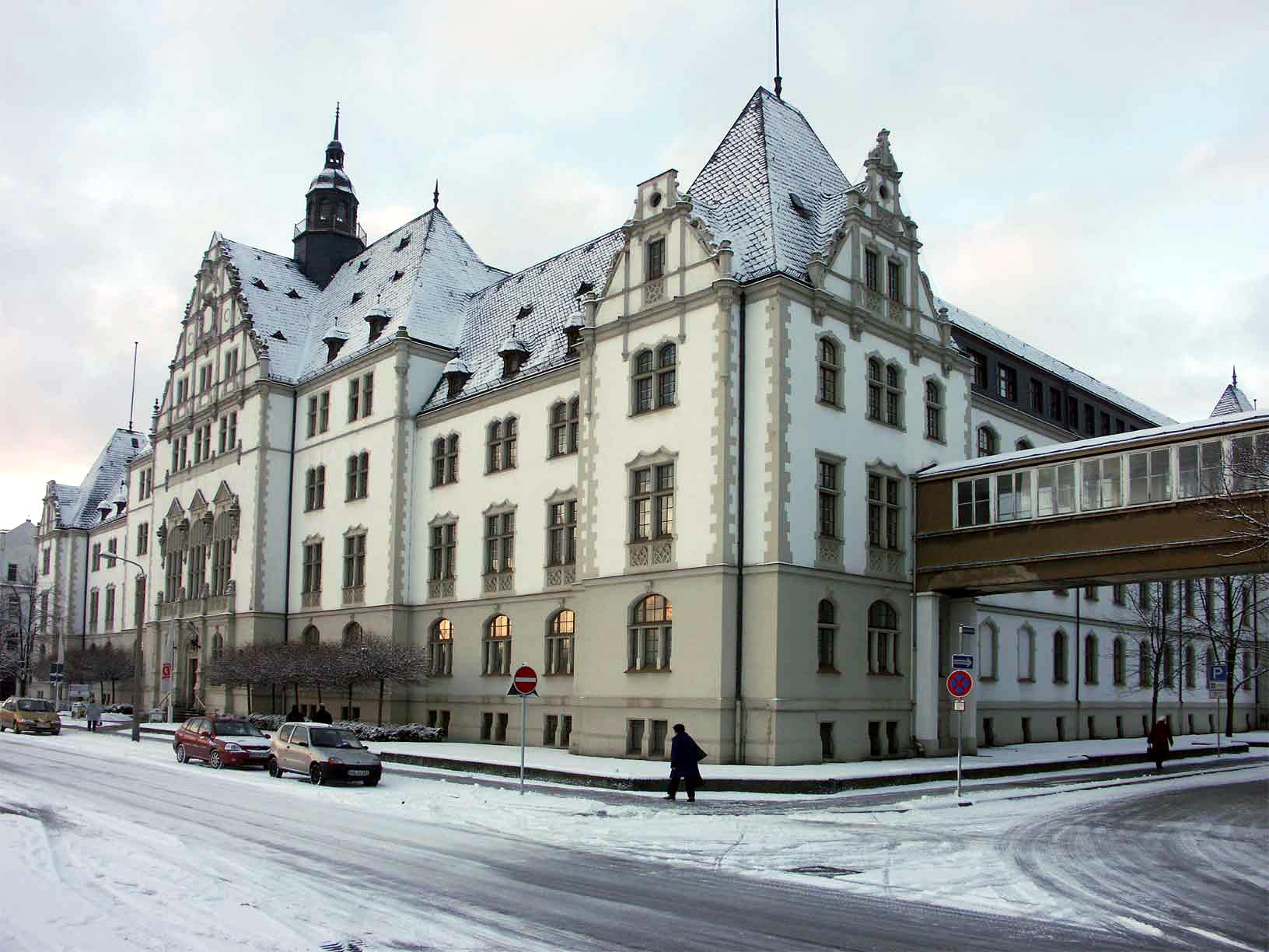 Gebäude der früheren Reichsbahndirektion Halle, Ernst-Kamieth-Straße 2, 06112 Halle, rechts Übergang zum früheren Reichsbahnamt Halle; ab 1990 Nutzung durch DB AG und Hauptsitz des Landesverwaltungsamtes Sachsen-Anhalt; erbaut 1901/02 nach Plänen des Regierungsbaumeisters Eduard Fürstenau (1862 Marburg – 1938 Berlin), erweitert 1929 bis 1938; ein baugleiches Gebäude soll es für die frühere Reichsbahndirektion Breslau in Stadt Breslau/ heutiges Wroclaw geben